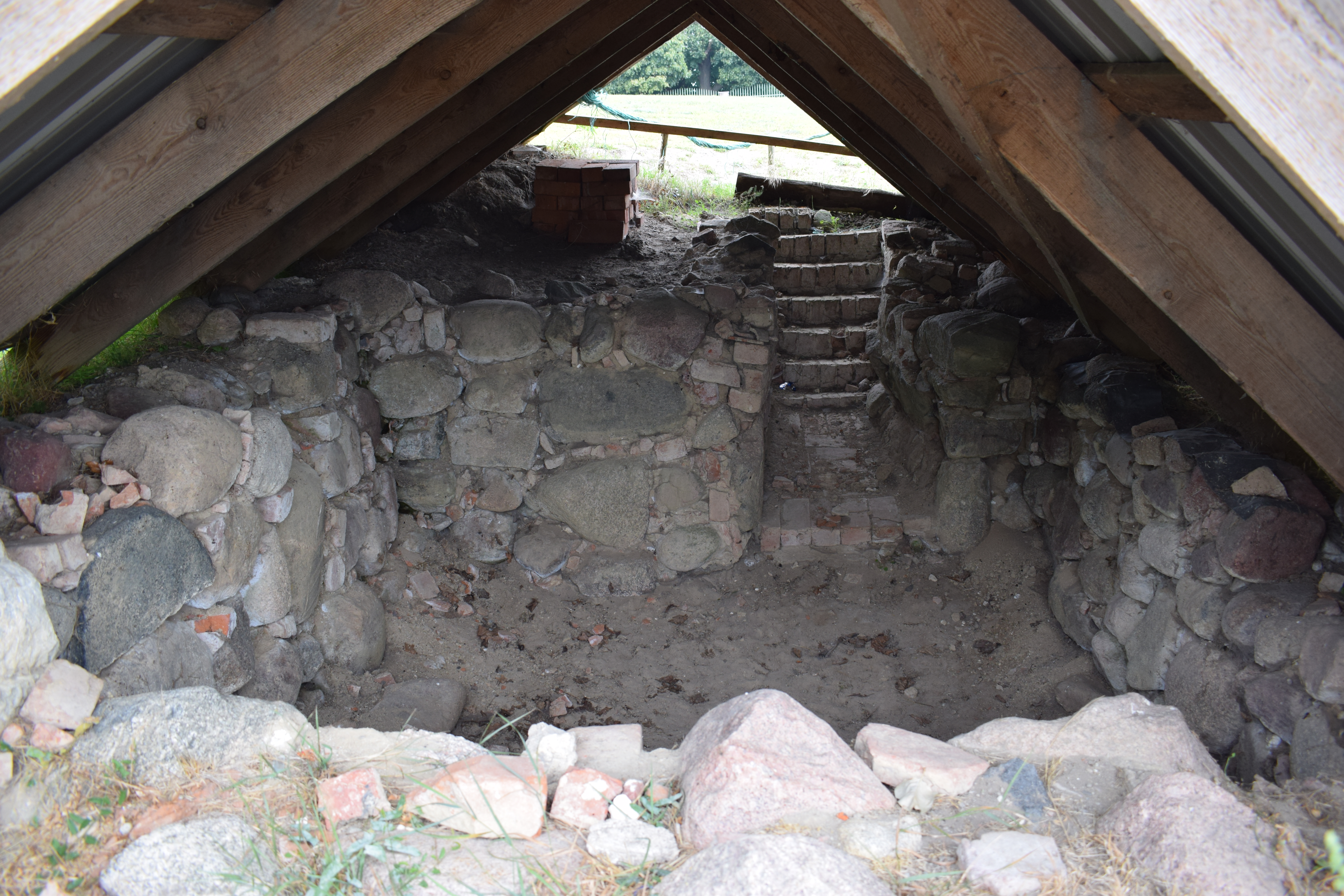 Reste eines Wohnturms, Grodzisko w Lubinie, Insel Wolin, Polen.